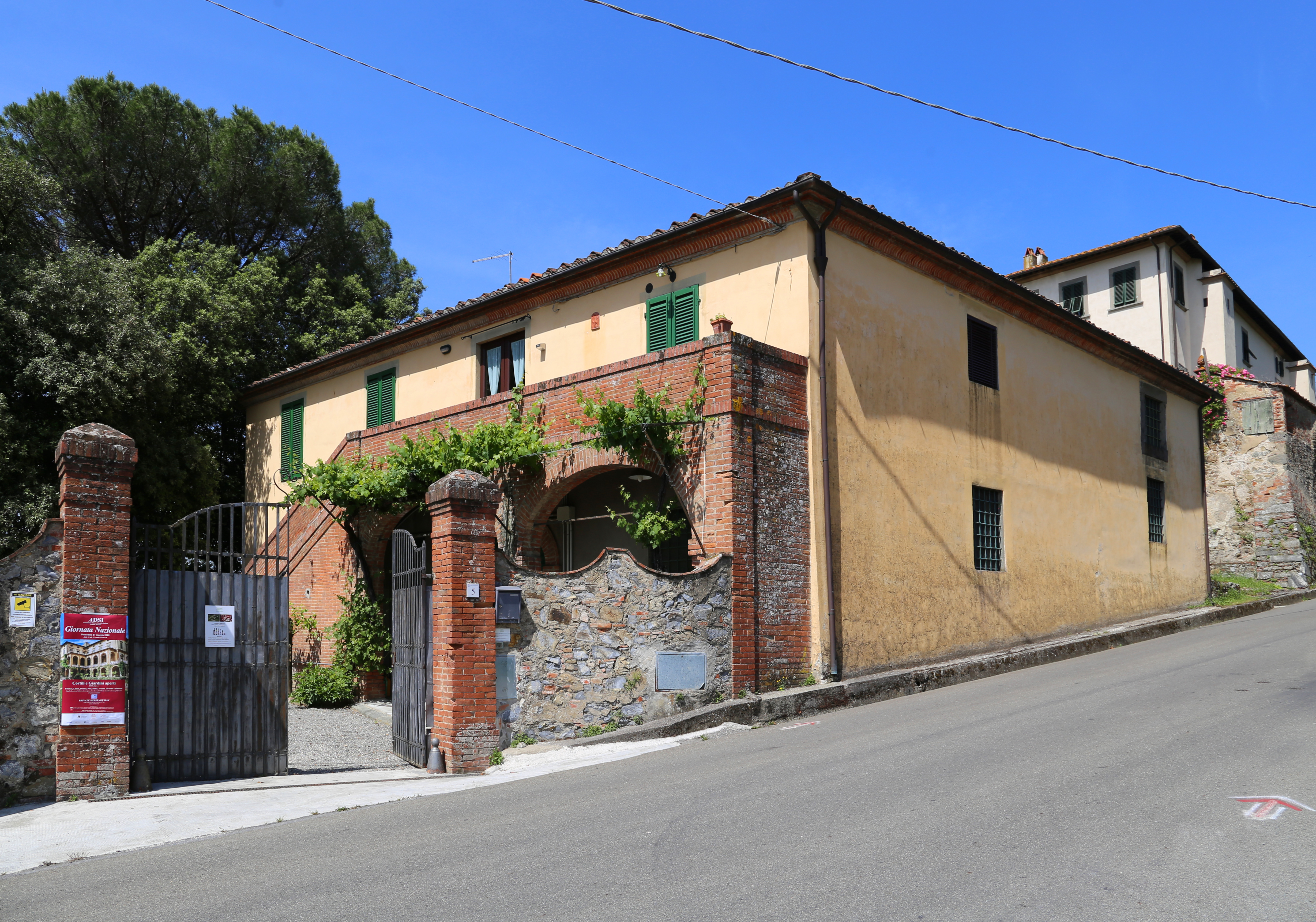 Villa La Guardatoia This is a photo of a monument which is part of cultural heritage of Italy.